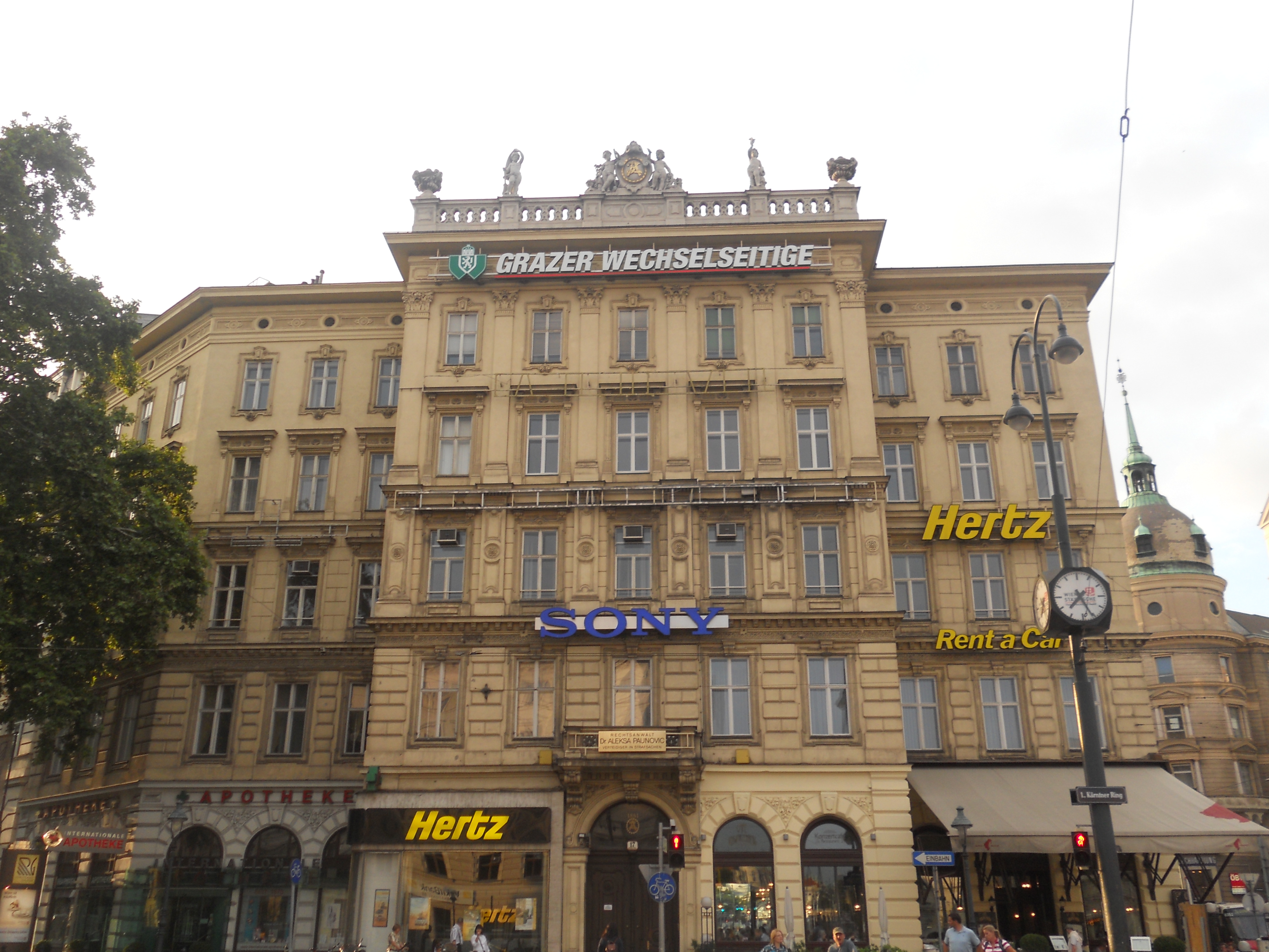 Haus Kärntner Ring 17 (=Schwarzenbergstraße 12)in Wien. Erbaut 1861/63 von Wilhelm Westmann